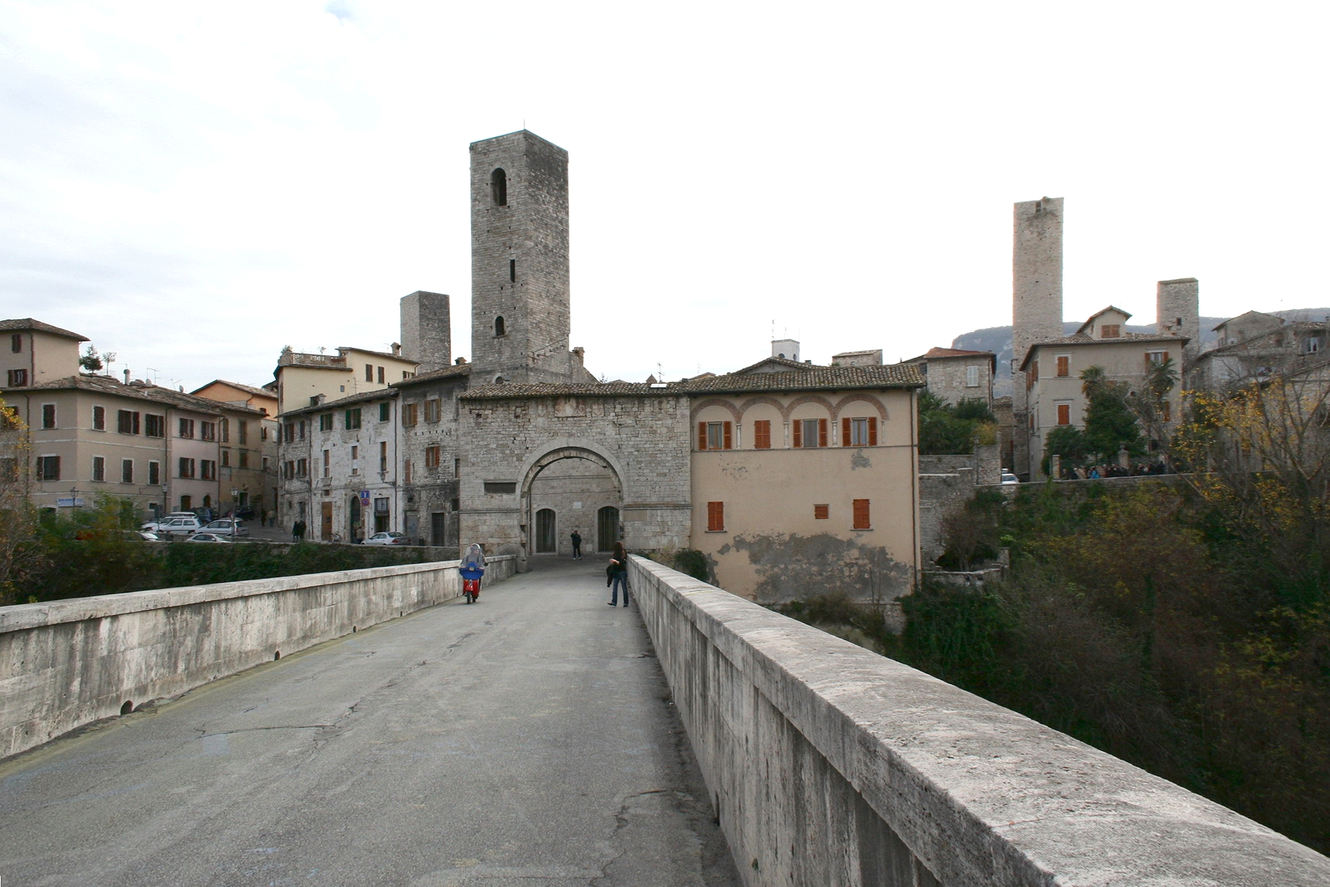 Ticket#2007040410014627 (ticket per le immagini) Porta Solestà di Ascoli Piceno, esterno giorno, proprio scatto Sibilla.io "Utilizzo concesso" Ticket#2007040410014627 (ticket per le immagini) This file is licensed under Creative Commons 3.0 license